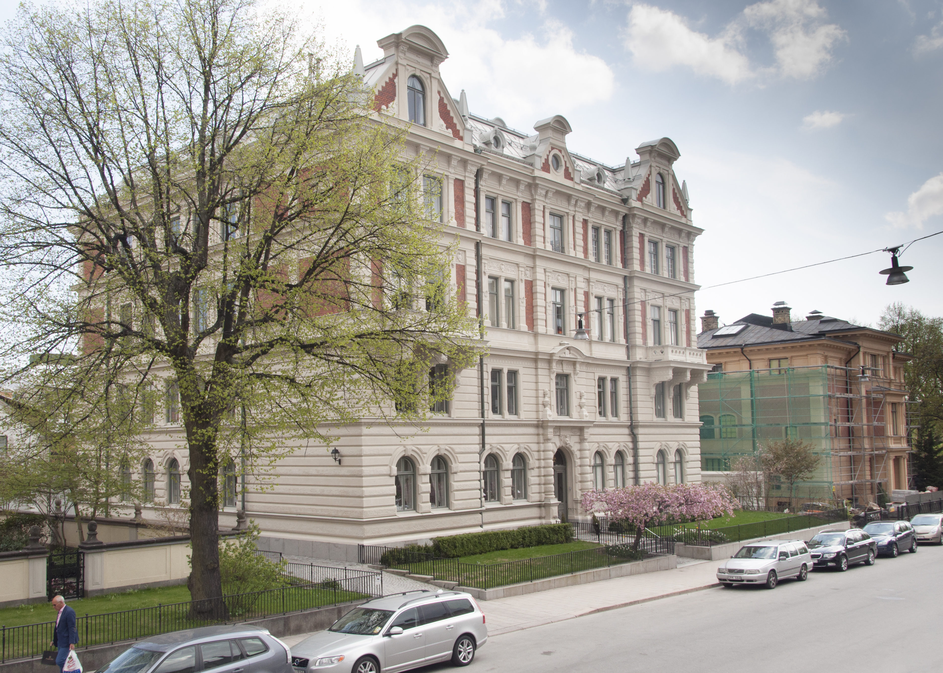 Wallenbergska huset, Villagatan 4. Från 1904 bebott av den Wallenbergska släkten. Byggnadsår 1887-88, arkitekter Axel & Hjalmar Kumlien byggherre O Ekman, byggmästare Ankarstrand & Nyström